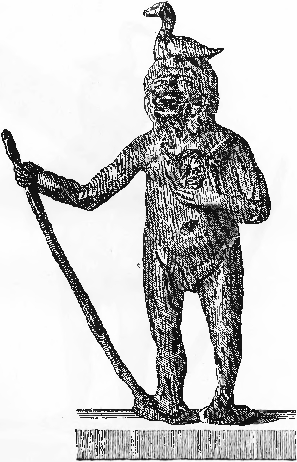 Tabl. II A. Bałwanki przylwickie. Radegast (przód), [w:] Franciszek Piekosiński, Kamienie mikorzyńskie, Kraków 1896; przedruk z: Andreas Gottlieb Masch, Daniel Woge, Die gottesdienstlichen Alterthümer der Obotriten, aus dem Tempel zu Rhetra, am Tollenzer-See, Berlin 1771, fig. 1.a.